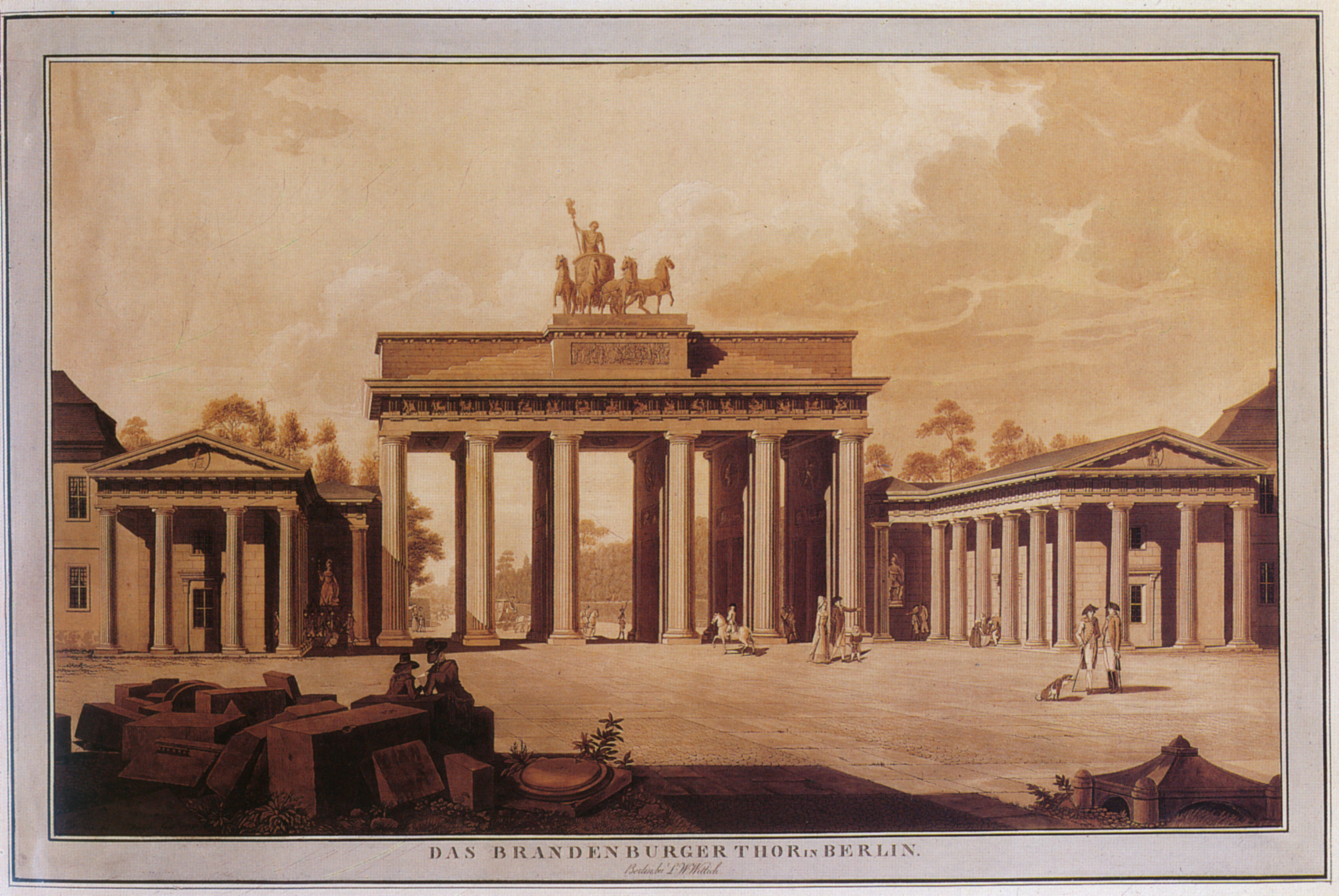 Diese Mediendatei wurde durch die Stiftung Stadtmuseum Berlin für die Wikimedia-Projekte zur Verfügung gestellt.